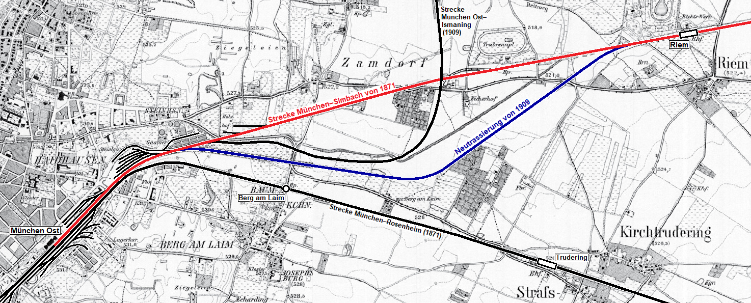 Die Karte zeigt die Verlegung der Bahnstrecke München–Simbach zwischen den Stationen München Ost und Riem im Jahr 1909, um das Baufeld für den Rangierbahnhof München Ost freizumachen. Die alte eingleisige Trasse von 1871 (rot) wurde durch eine weiter südlich verlaufende zweigleisige Trasse (blau) ersetzt.